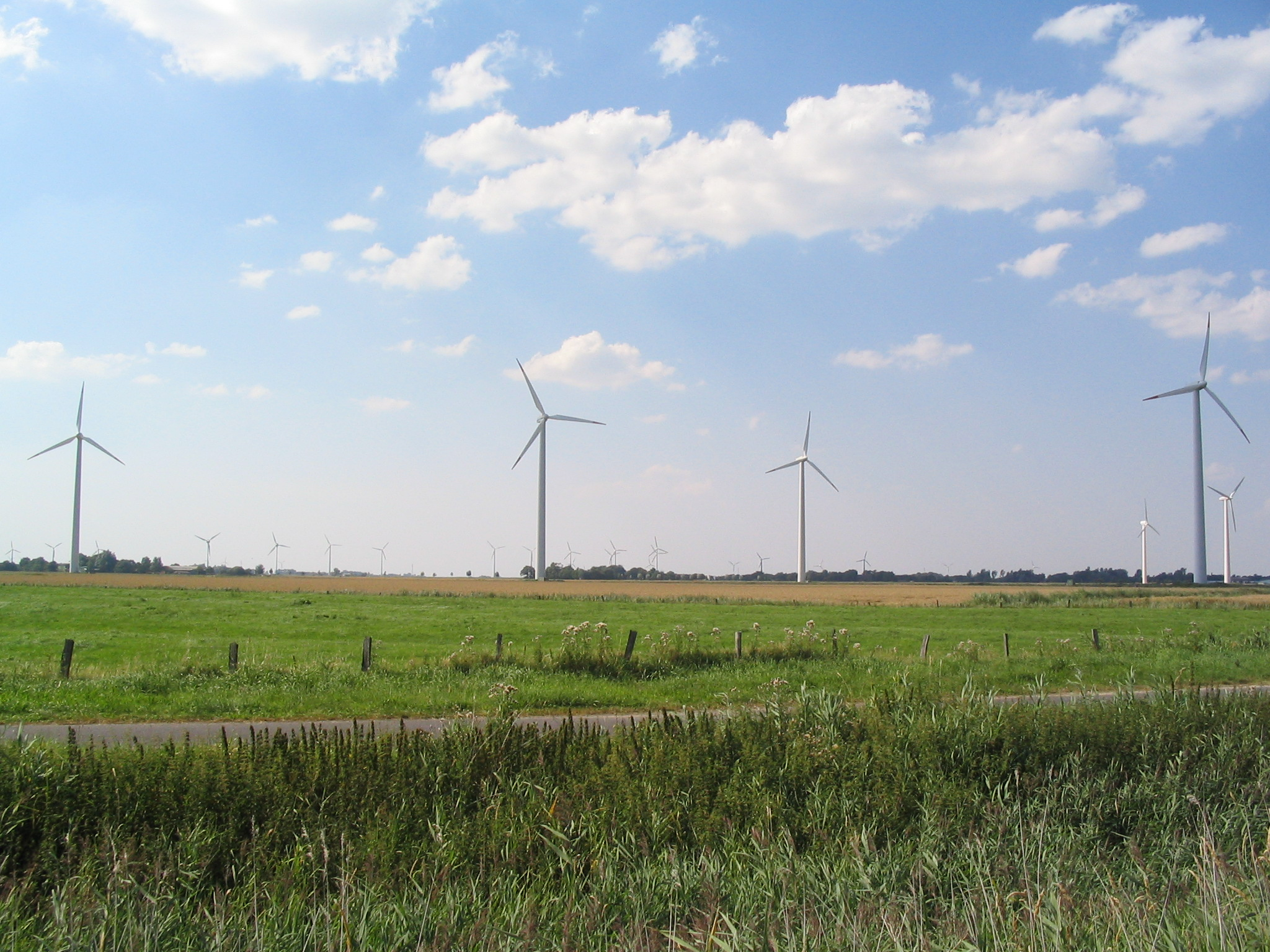 Wind turbines in Neuenkirchen, Dithmarschen. Picture taken in Westerkoog, Dithmarschen, Schleswig-Holstein, Germany.